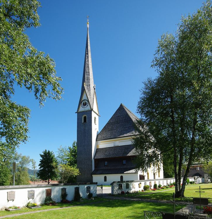 Abt-Johannes-Hoeck-Str. 1, 83334 Inzell, Kath. Filialkirche Mariae HimmelfahrtThis is a photograph of an architectural monument.